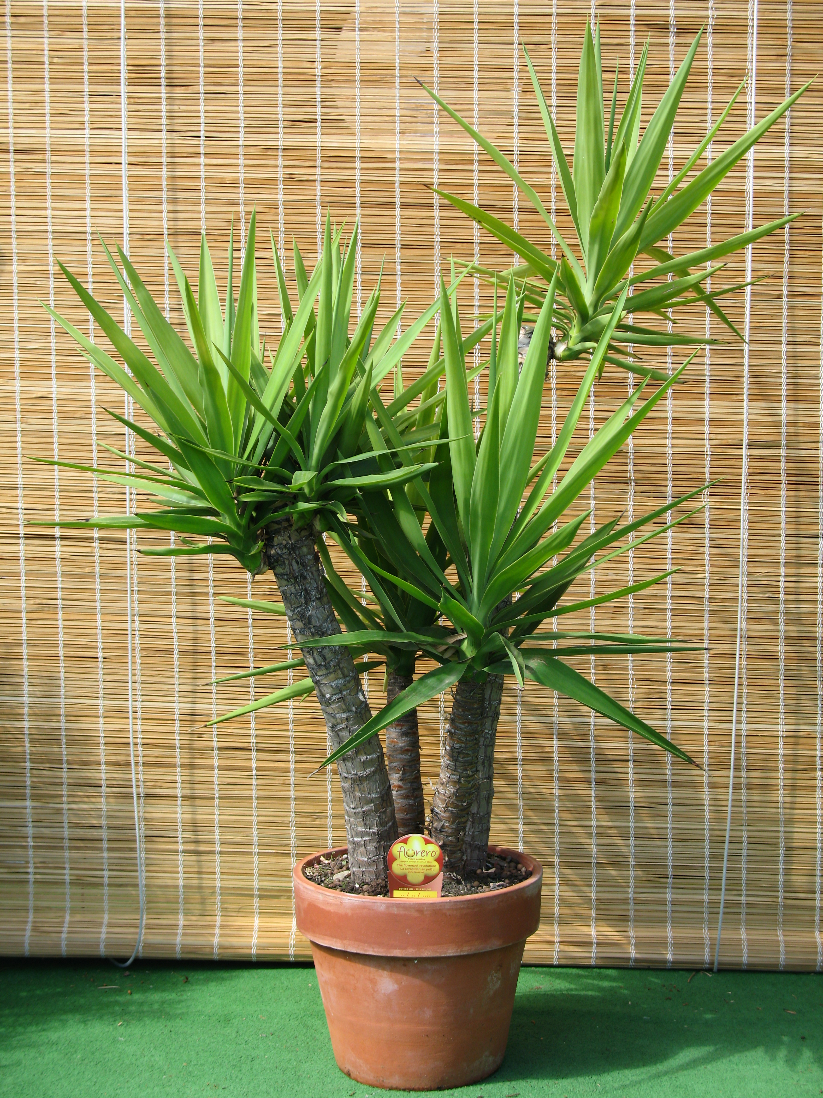 Yucca gloriosa in clay pot + Florero®